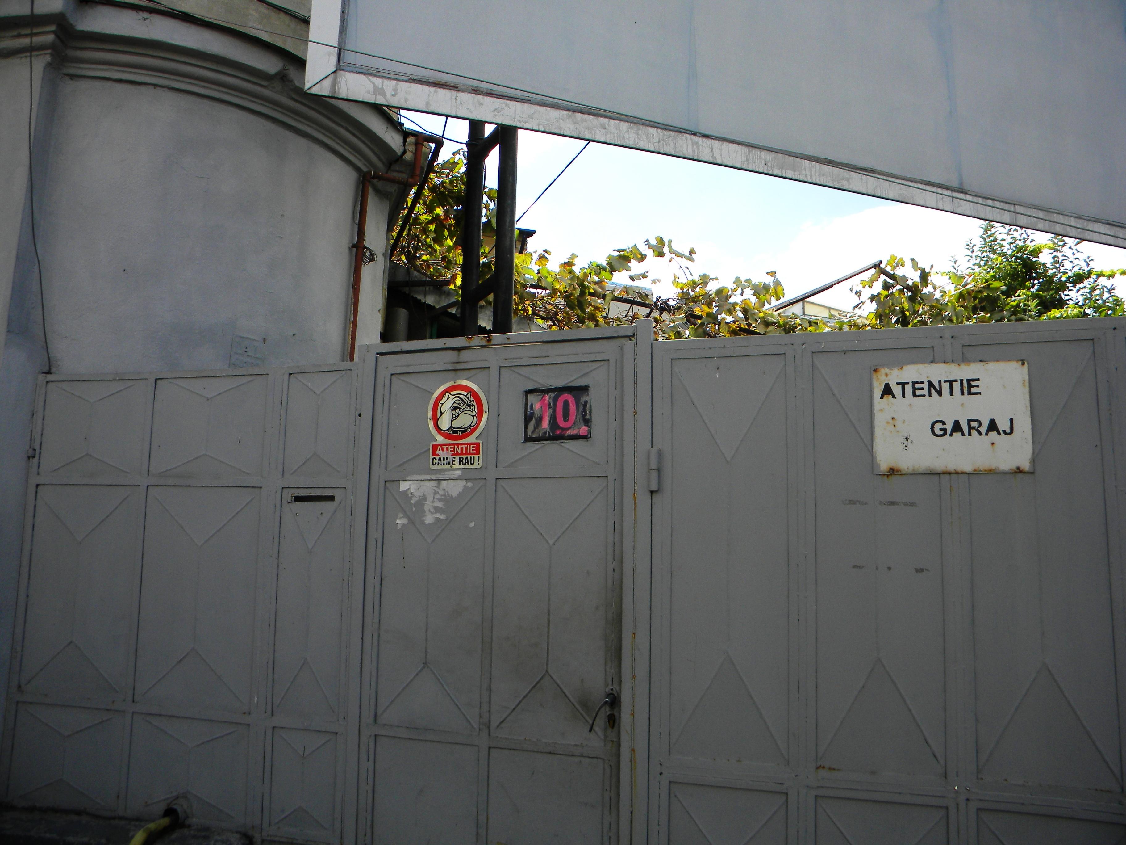 Bucuresti, Romania, Casa pe Str. C.F.Robescu, nr. 10, sect. 3 (detaliu)